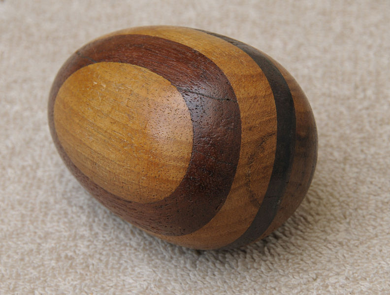 E Stëppelee aus Ahorn, Acajou a Kiischtenholz gedréint